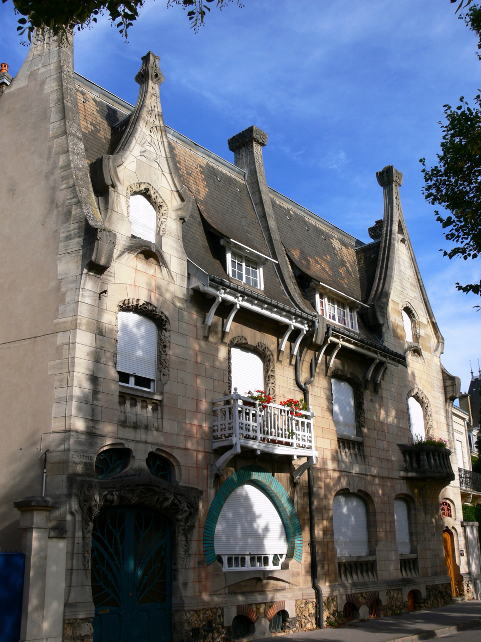 Maisons jumelées Huot, 92 et 92bis quai Claude le Lorrain, Nancy, Lorraine, France Construites en 1903 par Émile André